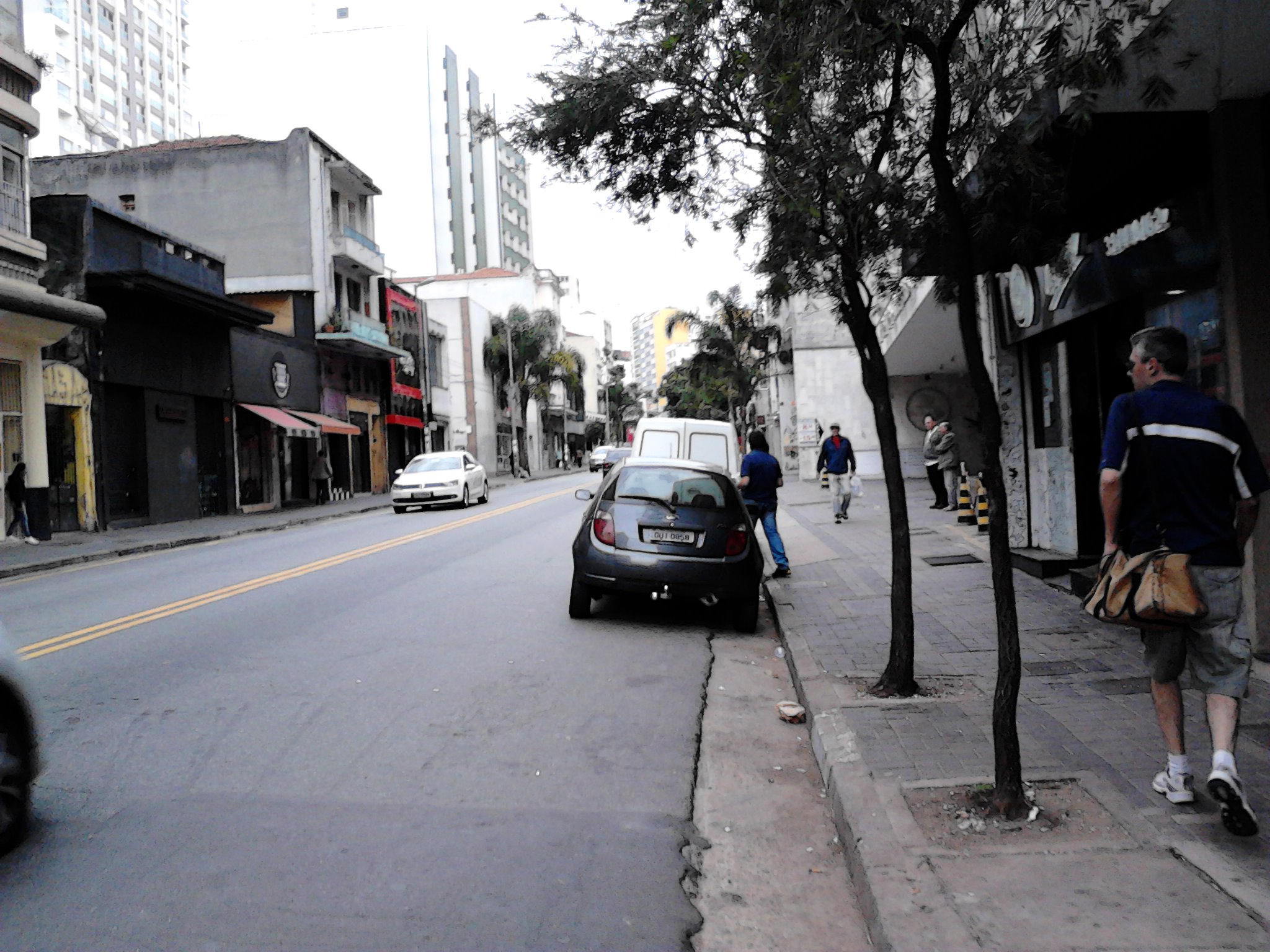 Rua Augusta, altura do número 900 no bairro da Consolação, São Paulo, Brazil